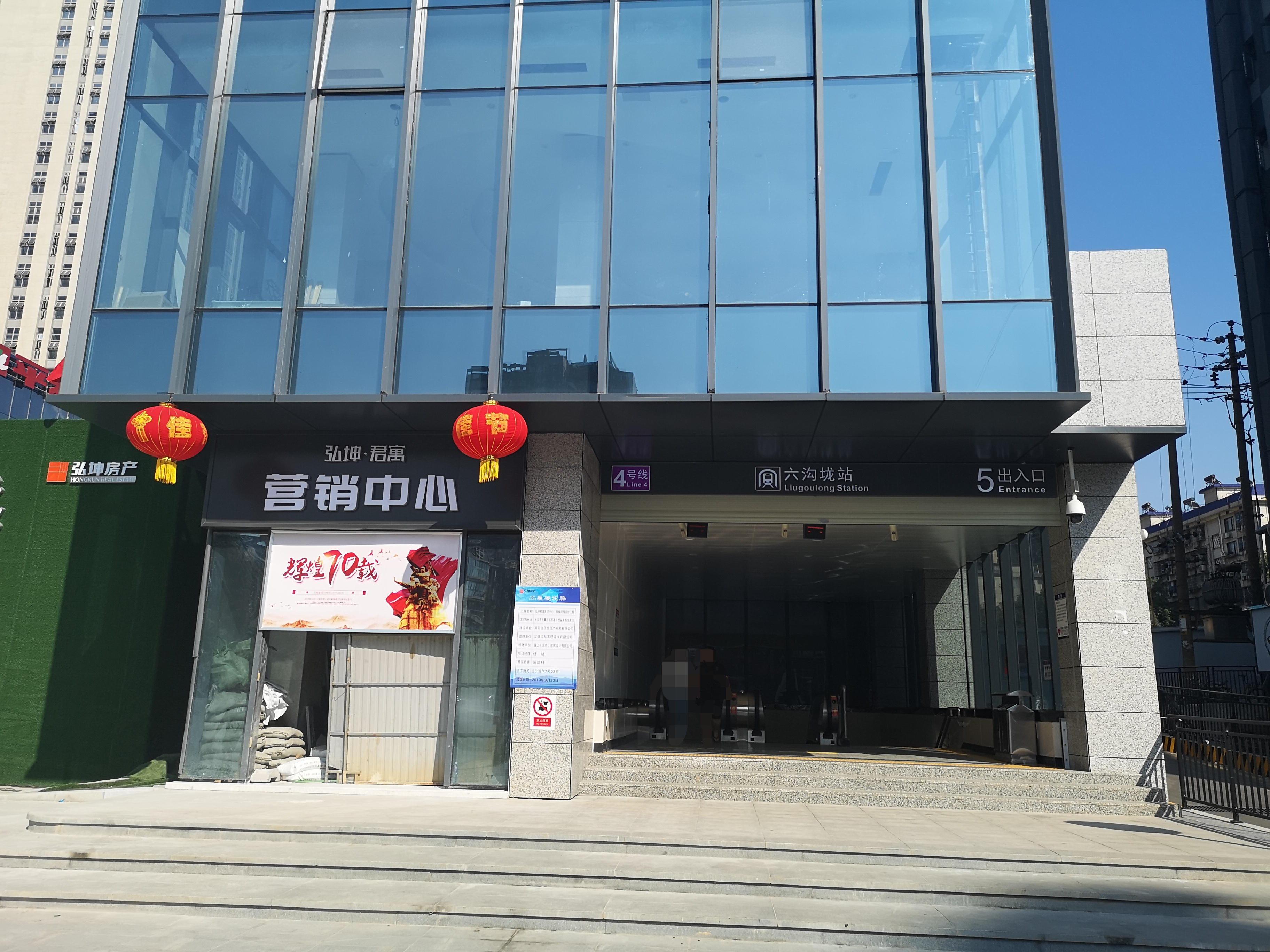 六沟垅站5号出入口，与2019年10月1日开通。